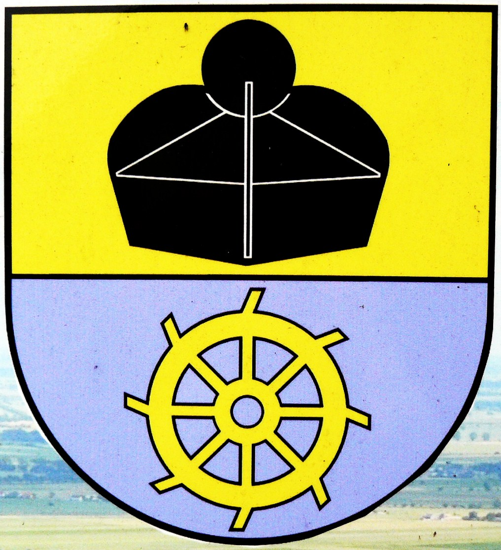 Fragment tablicy informacyjno-turystycznej w Popowie z herbem wsi.